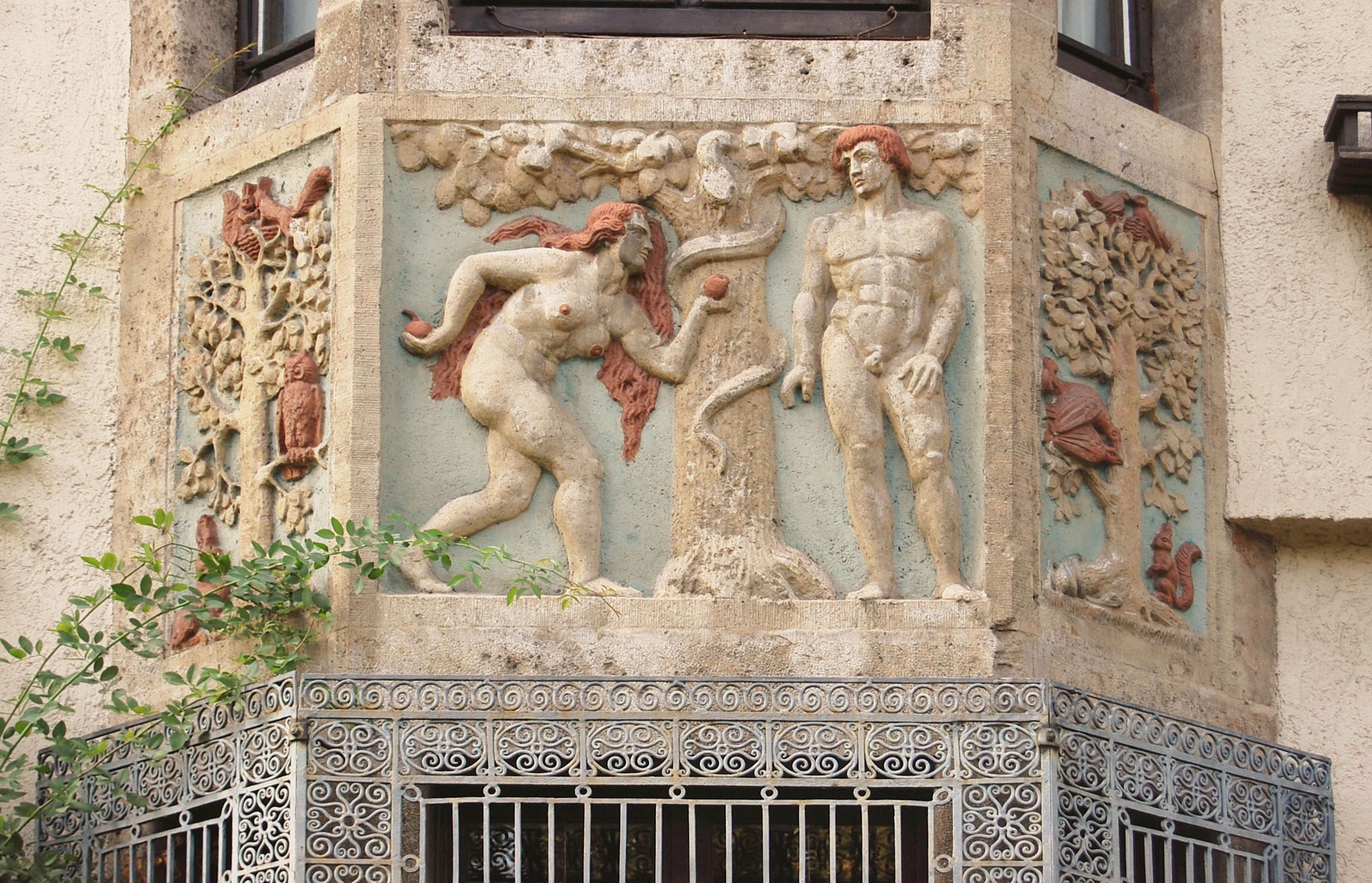 Gentil-Wohnhaus - fasada